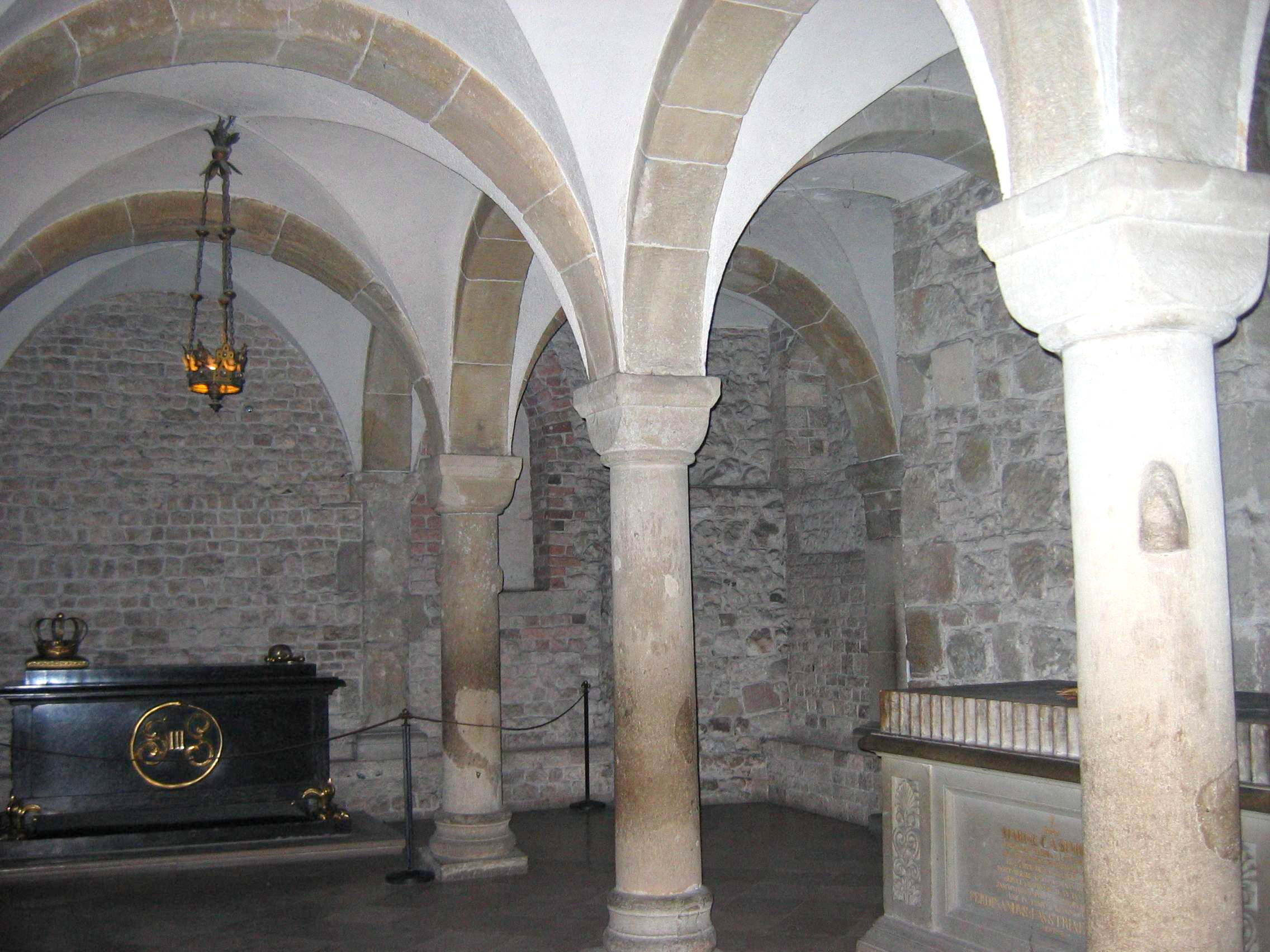 Saint Leonardo vault in Wawel, Kraków image taken by user:Mathiasrex Maciej Szczepańczyk